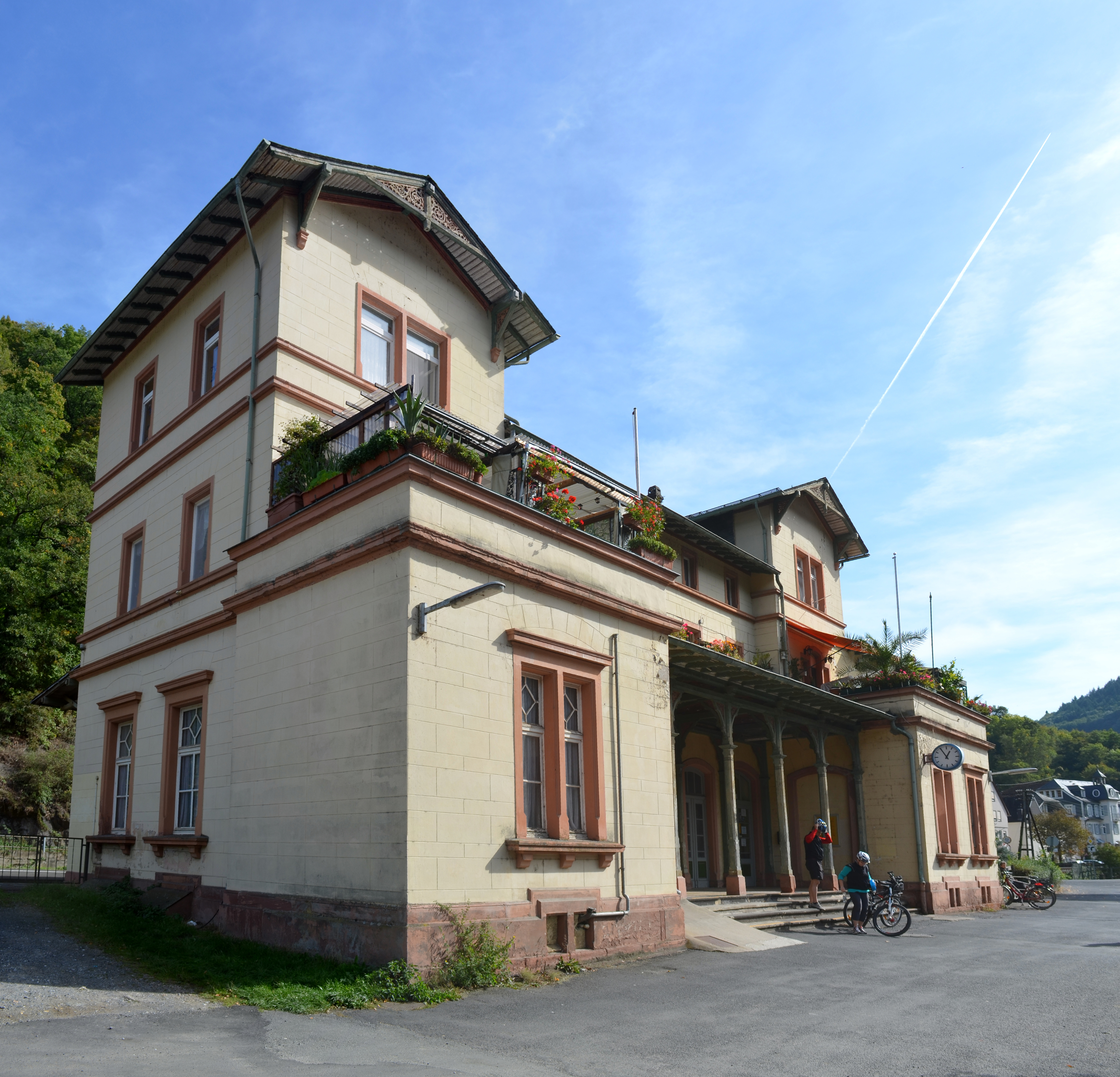 Balduinstein, Bahnhof